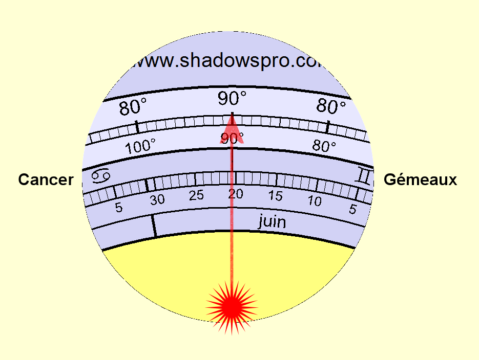 Sur un astrolabe, correspondance entre calendrier civil et zodiacal le jour de l'été.